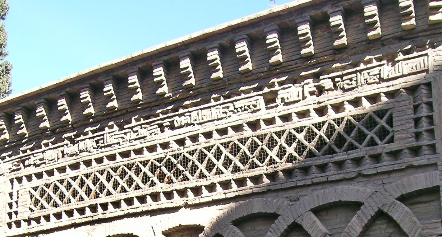 Decoración en Sebka (Detalle) en la portada de la Mezquita de Bab al-Mardum en Toledo (España)